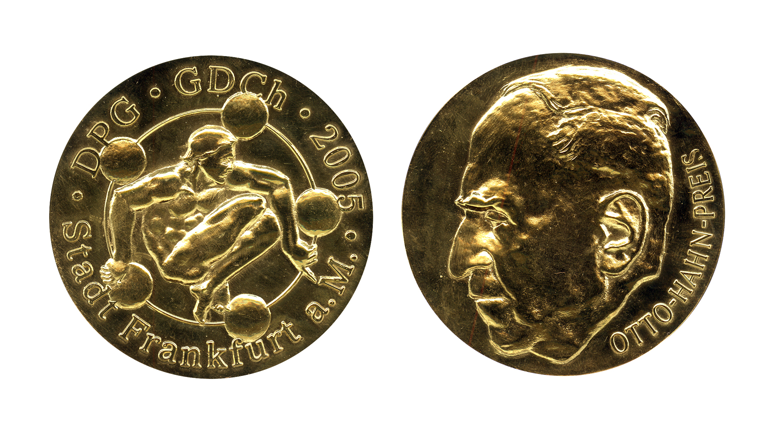 Abbildung der Medaille (Vor- und Rückseite)